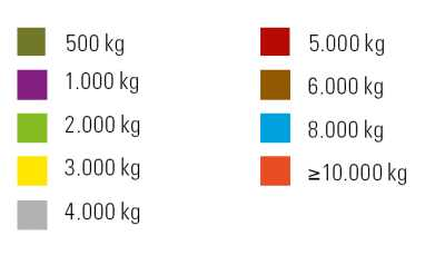 Rundschlingen DIN EN Norm